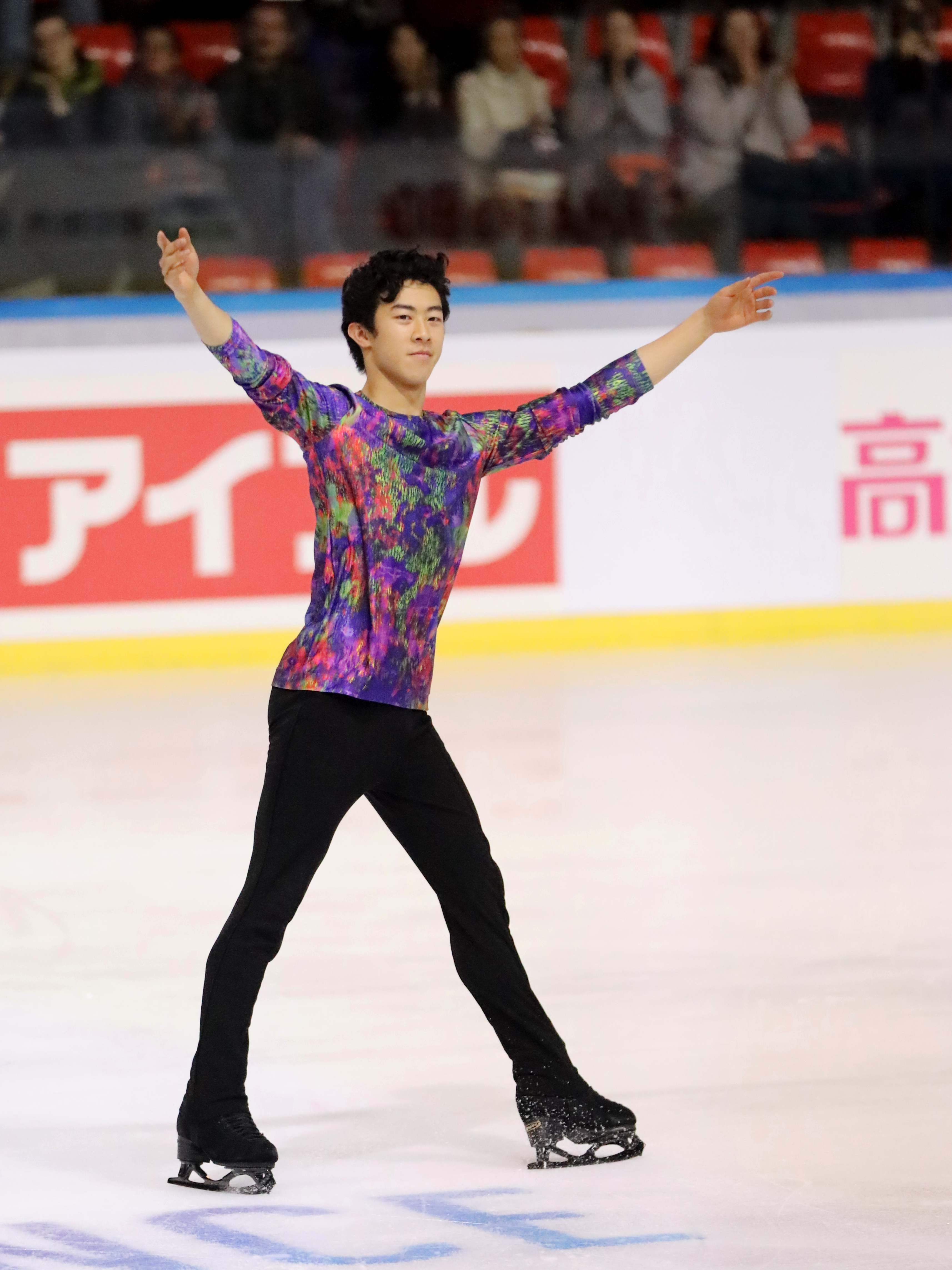 Nathan Chen aux Internationaux de France 2019